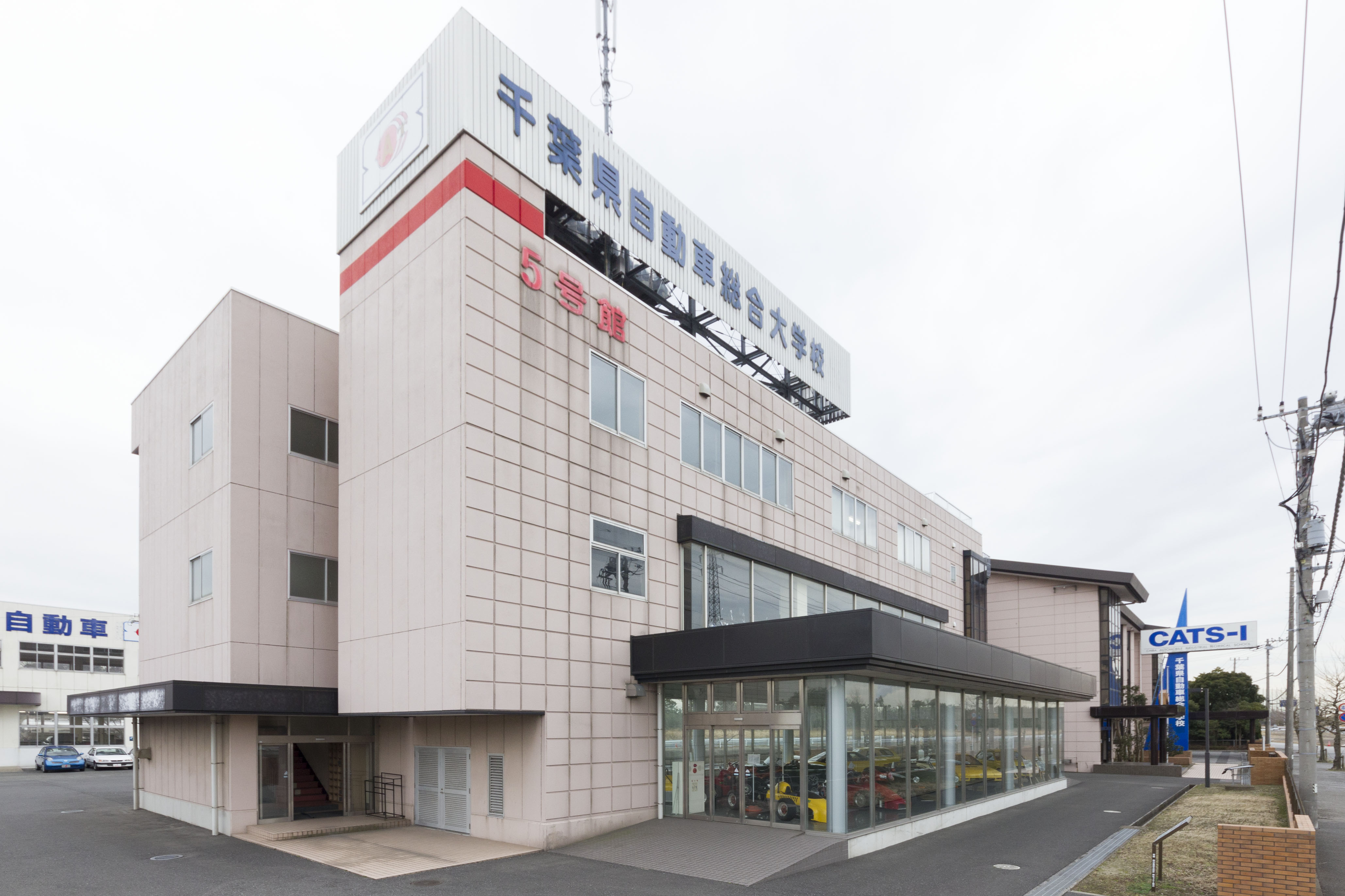 専門学校 千葉県自動車総合大学校校舎全景